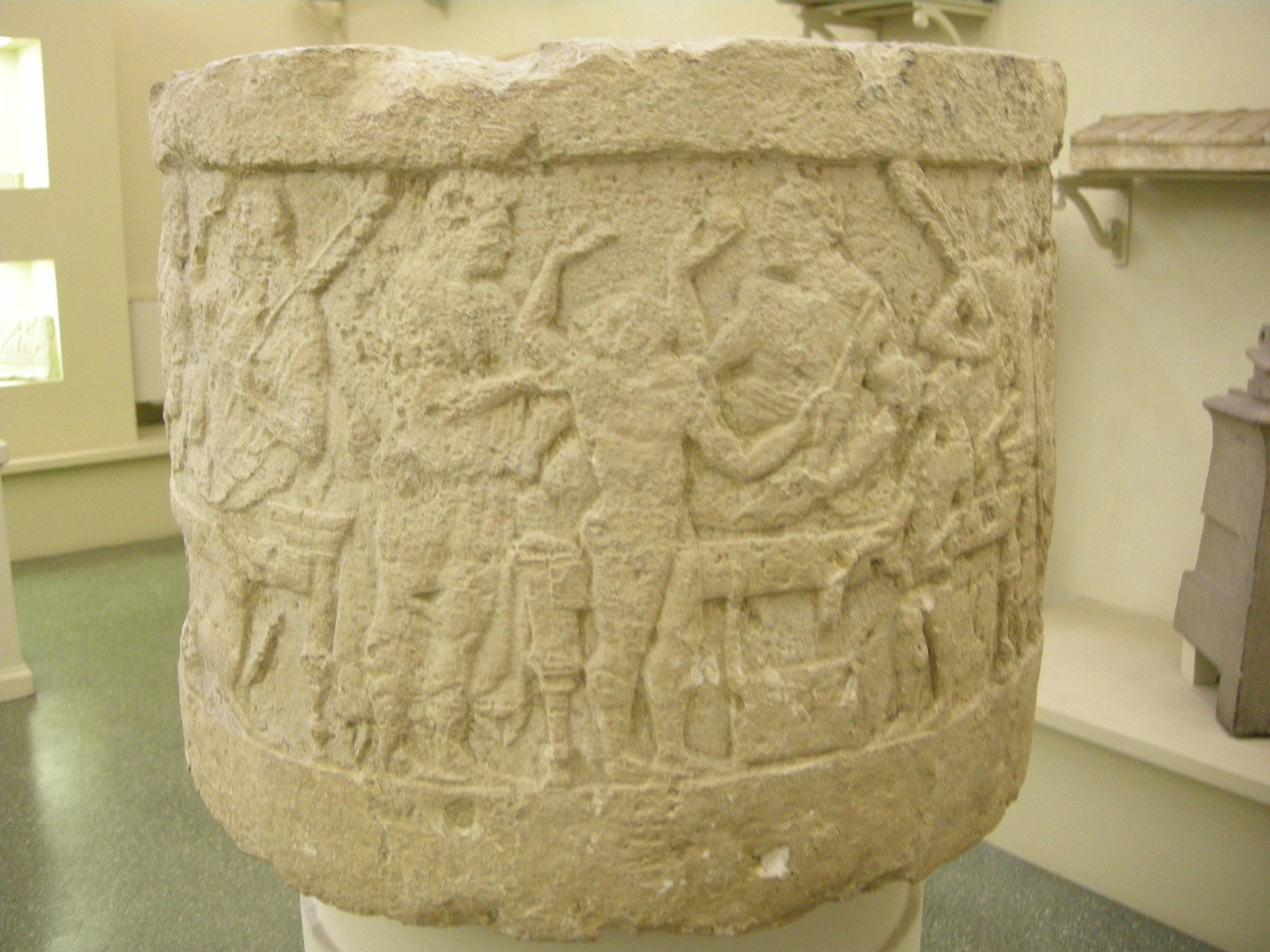 Cippo etrusco cilindrico da Chiusi con scena di banchetto, V sec. ac. Esposto al Museo archeologico di Firenze.